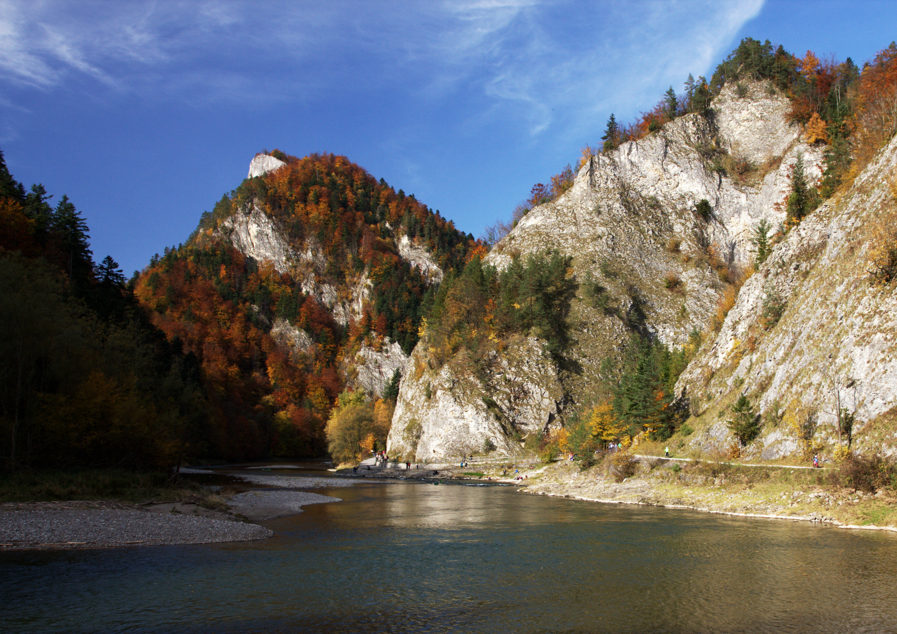 Park narodowy: Pieniński Park Narodowy, przełom dunajca. Szlak czerwony na odcinku Szczawnica - Czerwony Klasztor This is a photography of protected area with CRFOP ID PL.ZIPOP.1393.PN.5